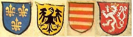 Hofämterspiel kártyajáték Ennek színeit a német, magyar, cseh, illetve francia címer képviseli. (Kunsthistorisches Museum, Bécs)